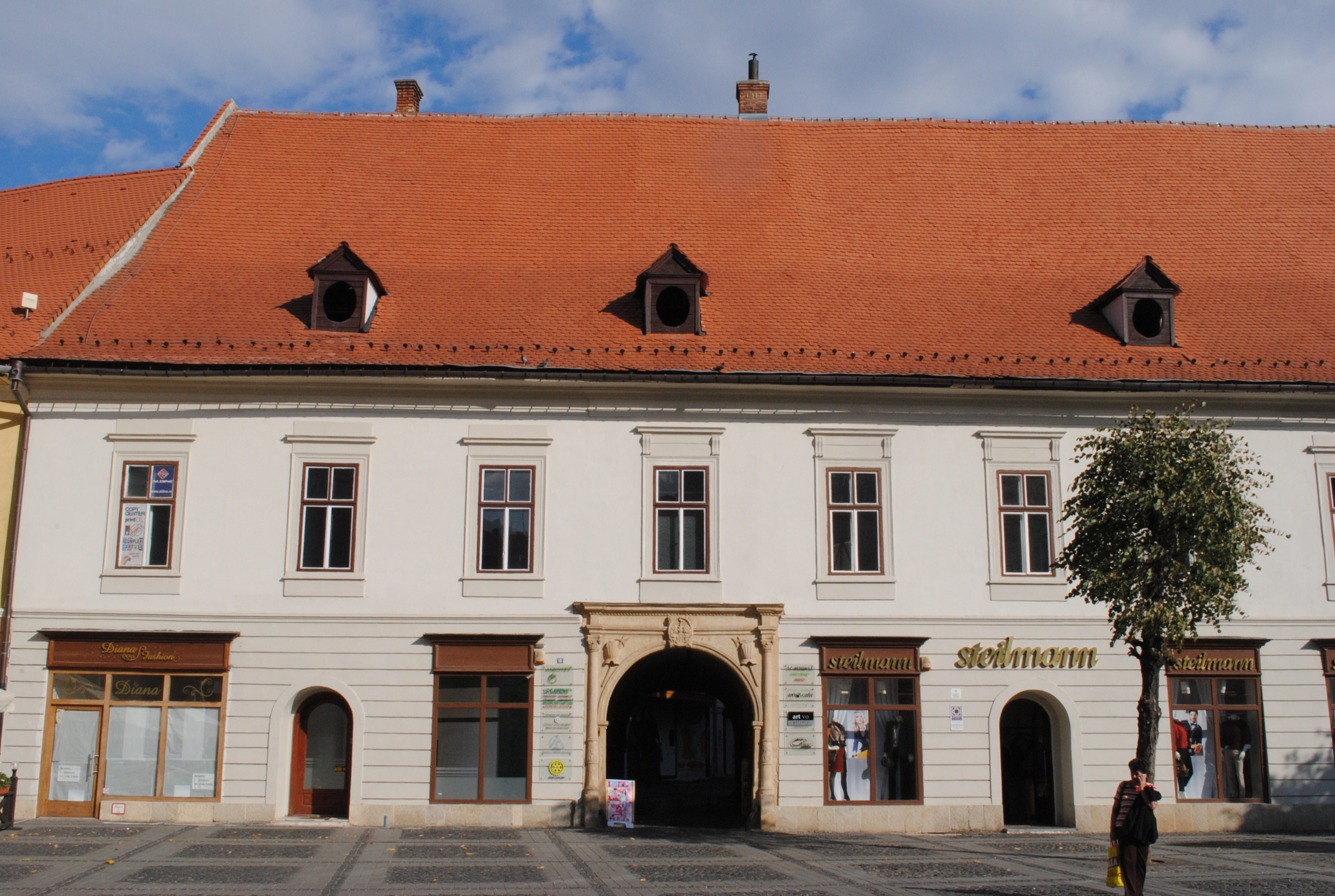 Casa Weidner-Reussner-Czekelius, sec. XV - XVIII, (1582, 1652); transf. sec. XX